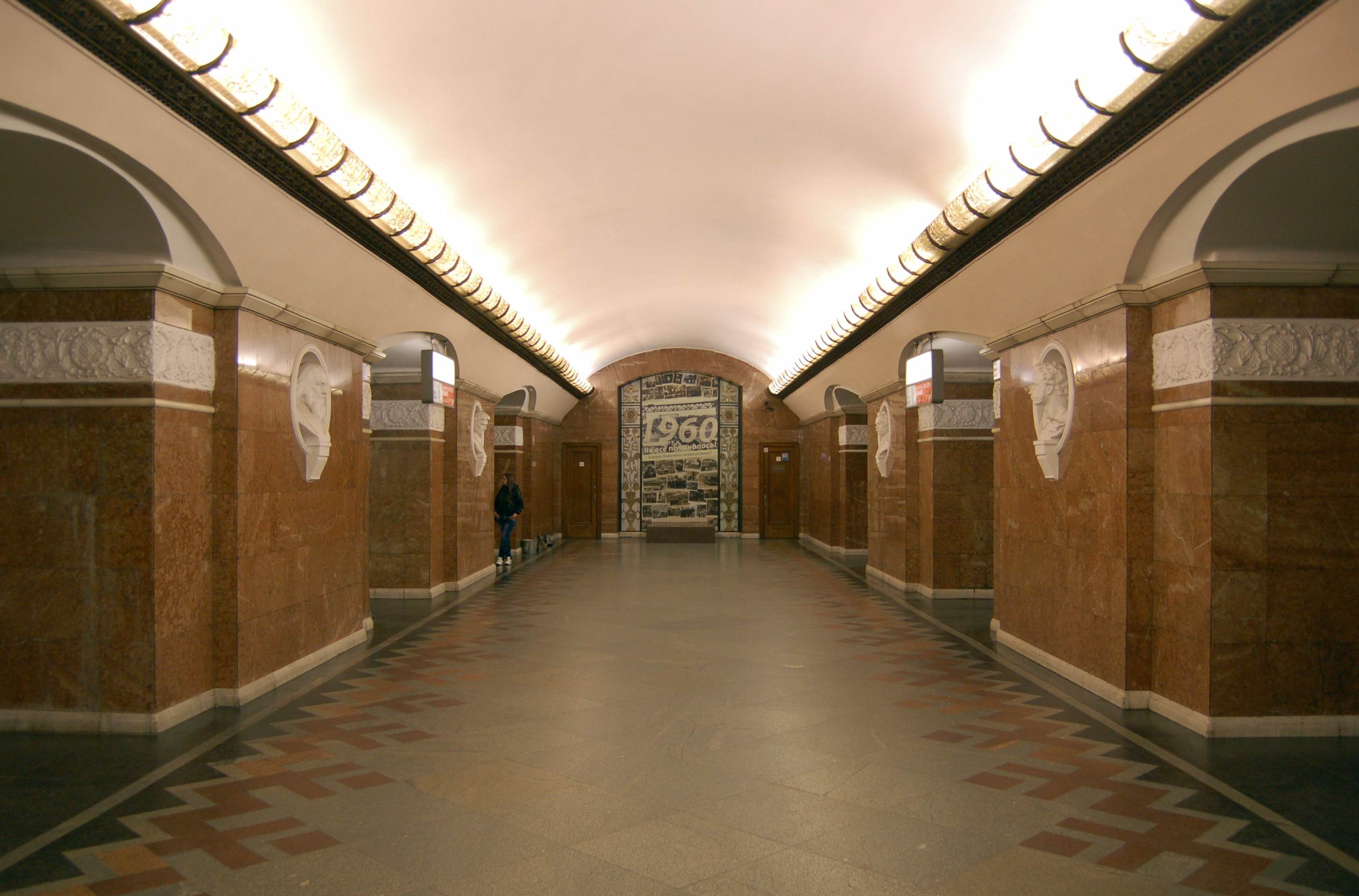 Станция метро «Университет», центральный зал